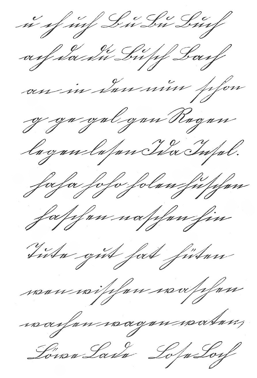 Leseübungen aus einer Schulfibel von 1903